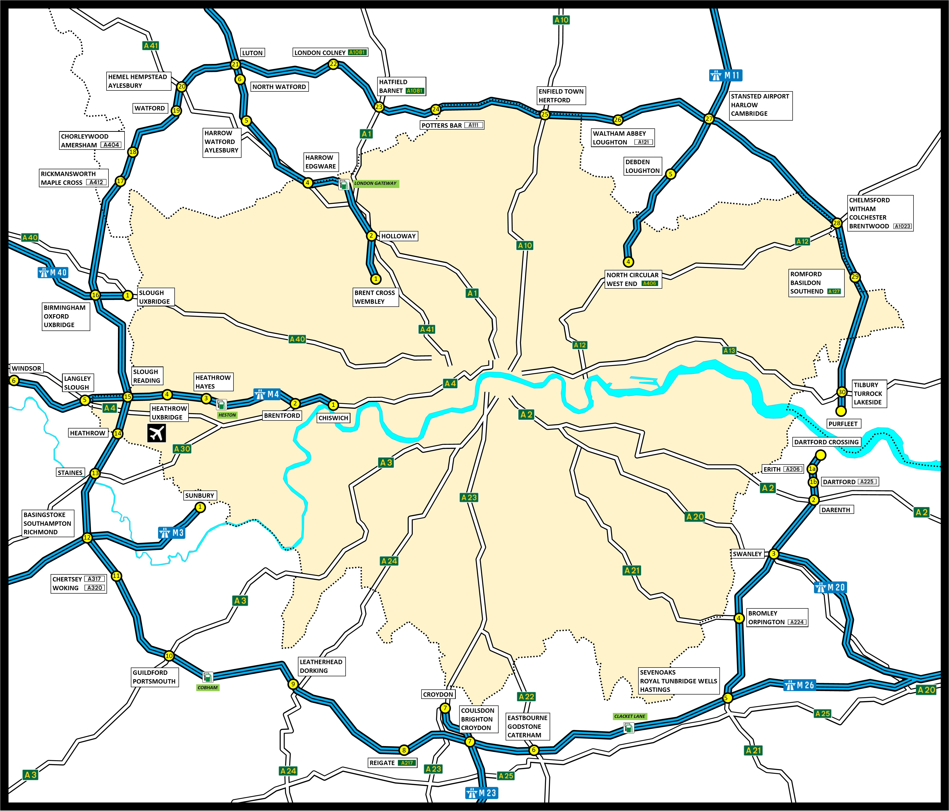 Mappa della Motorway M25 attorno a Londra